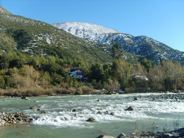 Vista al río Maipo, Región Metropolitana, Chile